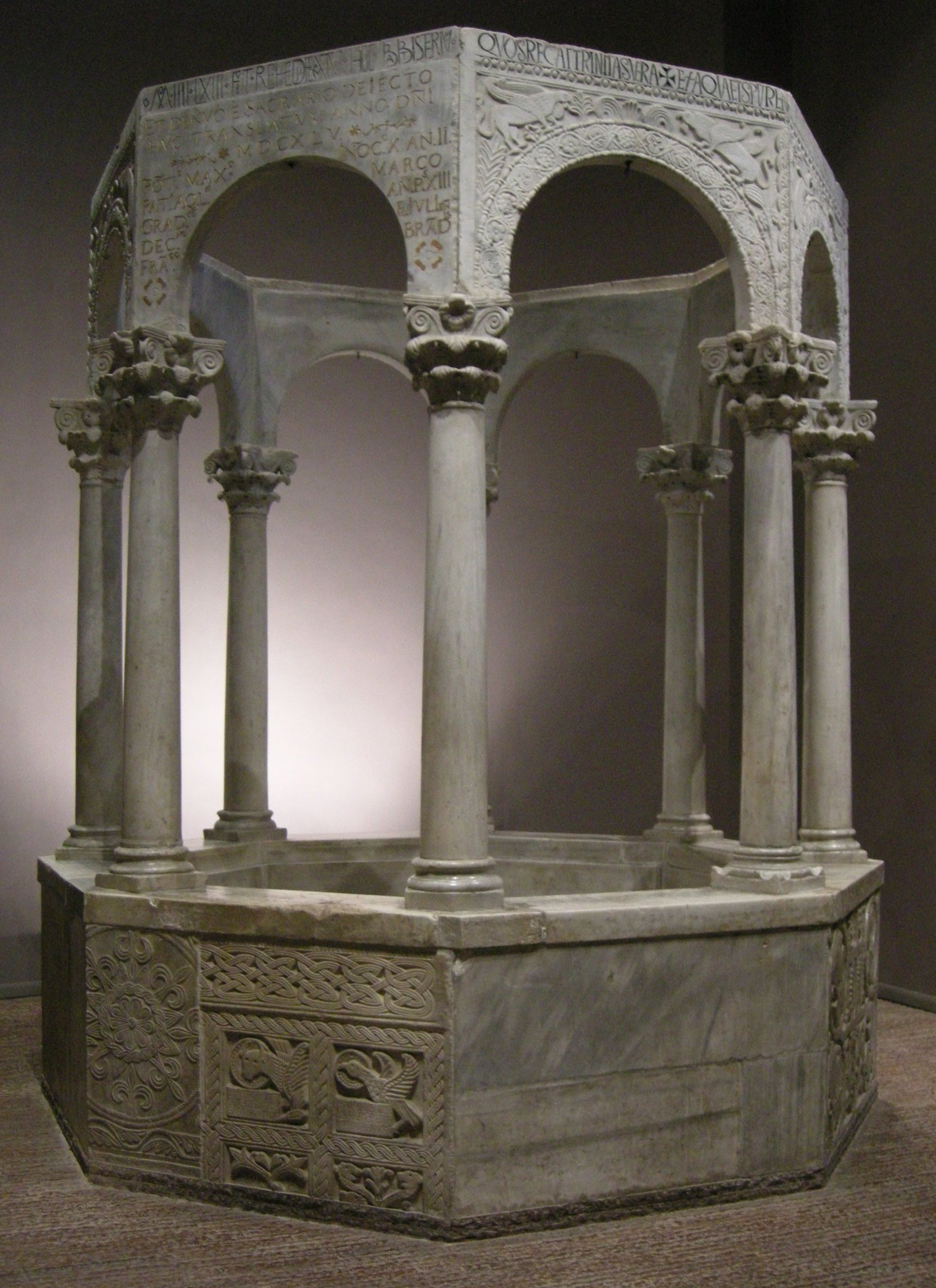 Cividale, museo cristiano, battistero di callisto